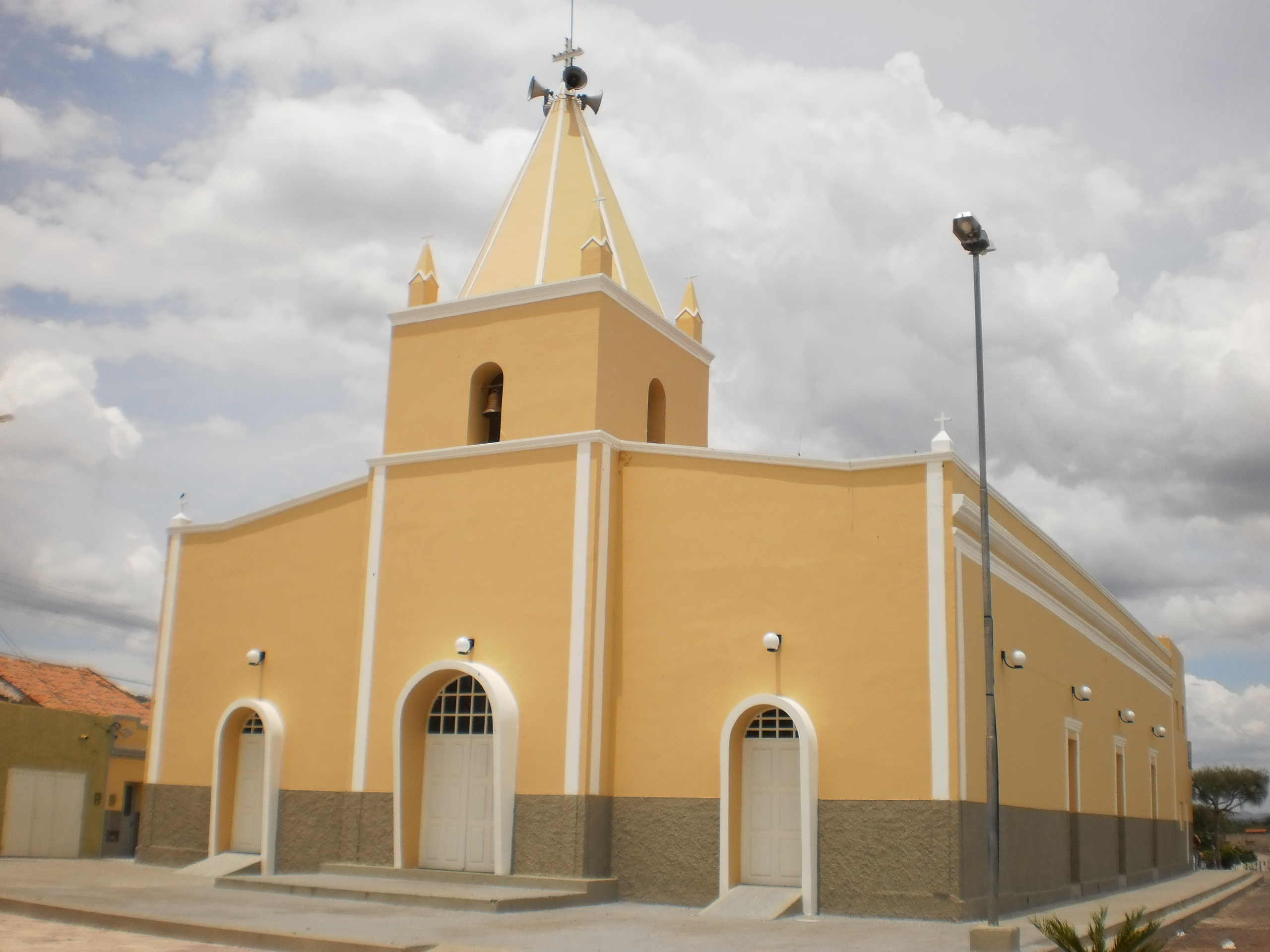 Igreja Matriz de Santo Antônio, sede da paróquia de Marcelino Vieira - Rio Grande do Norte, Brasil.